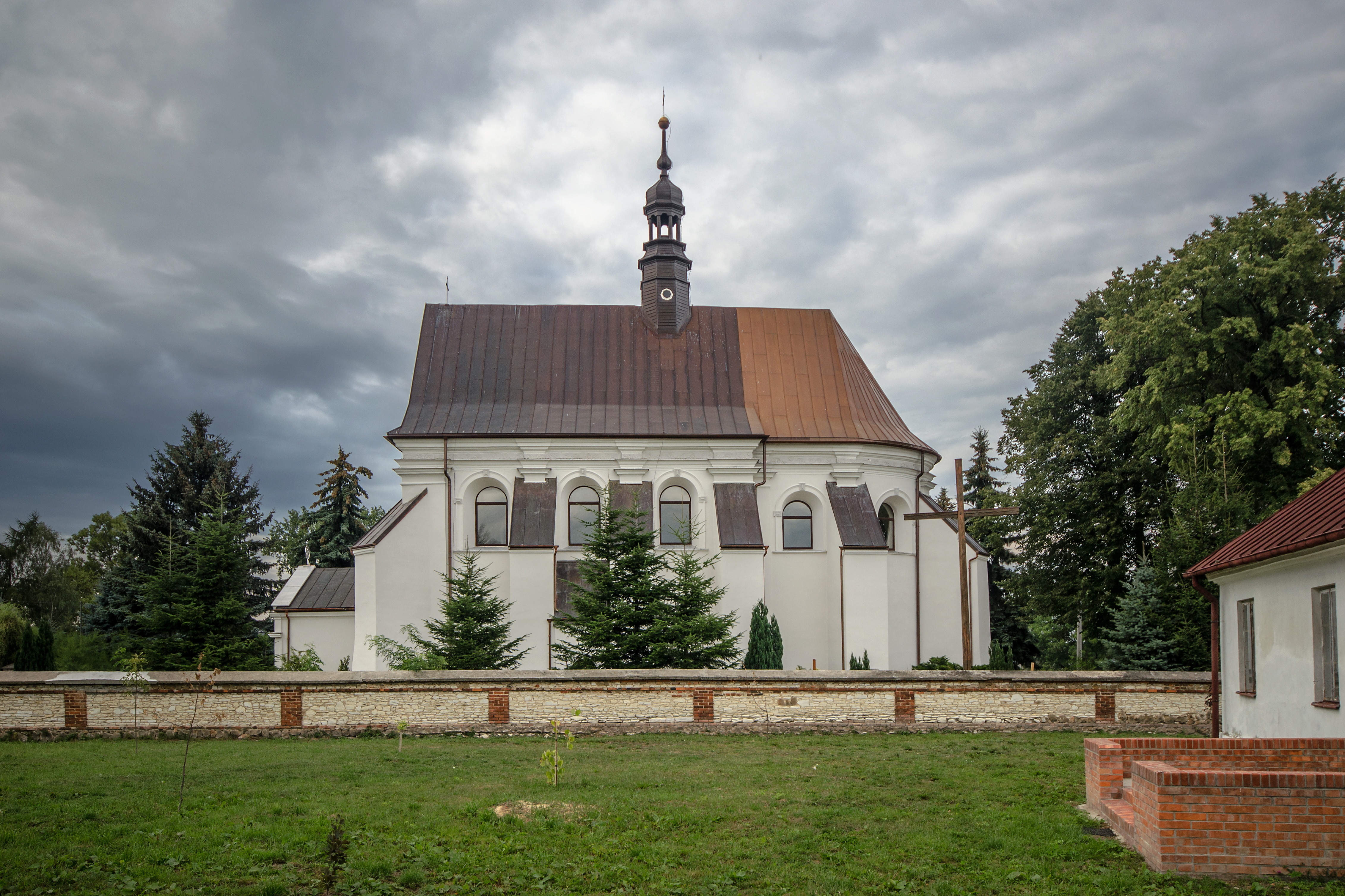 Nakło, kościół parafialny pw. św. Mikołaja, XVII/XVIII